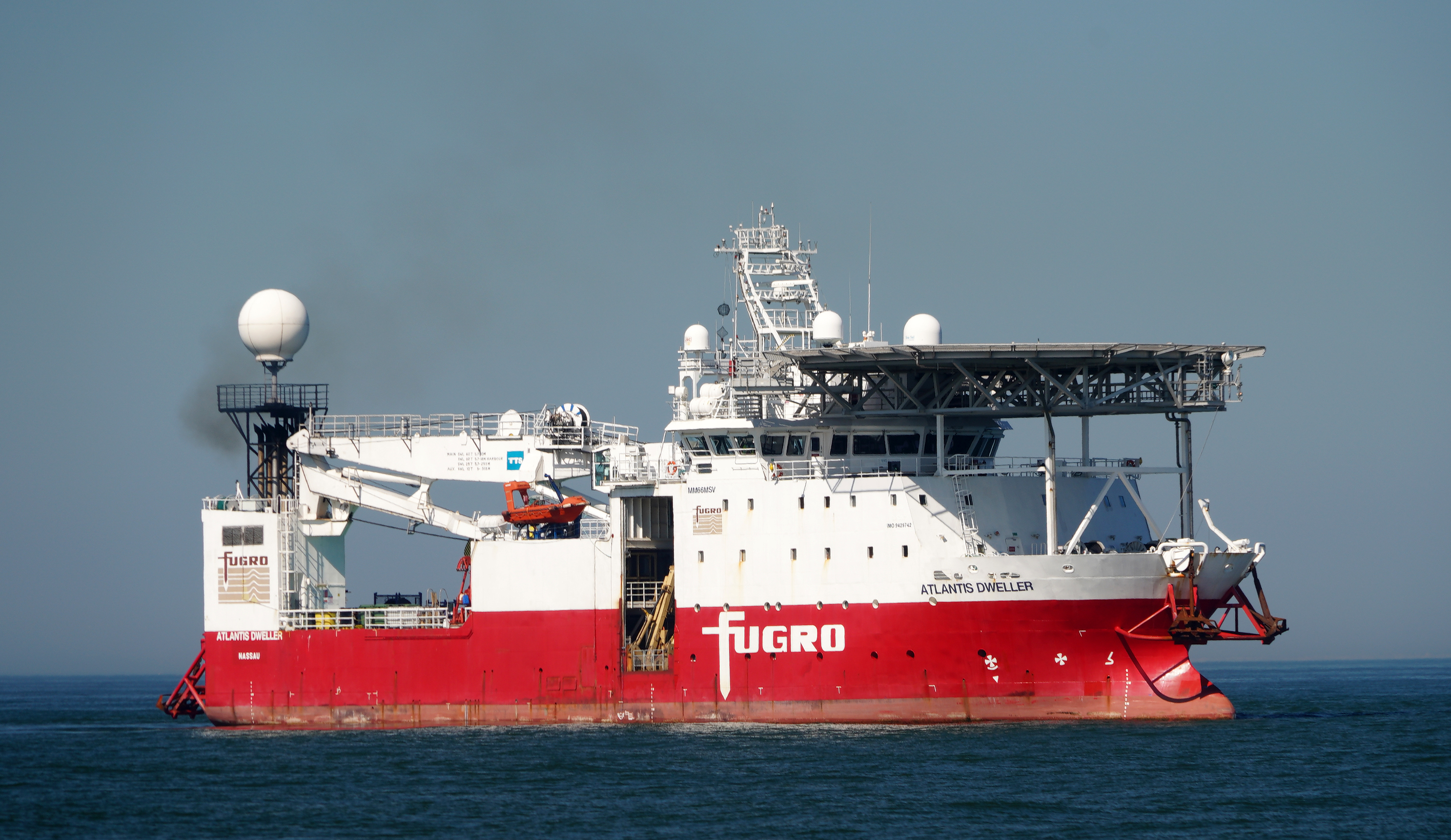 Met de ELBE vanuit Maassluis naar de Maasmond , Maasvlakte 1 & 2 en Europoort .